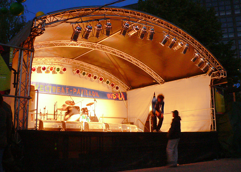 Bühne Masala Weltmarkt